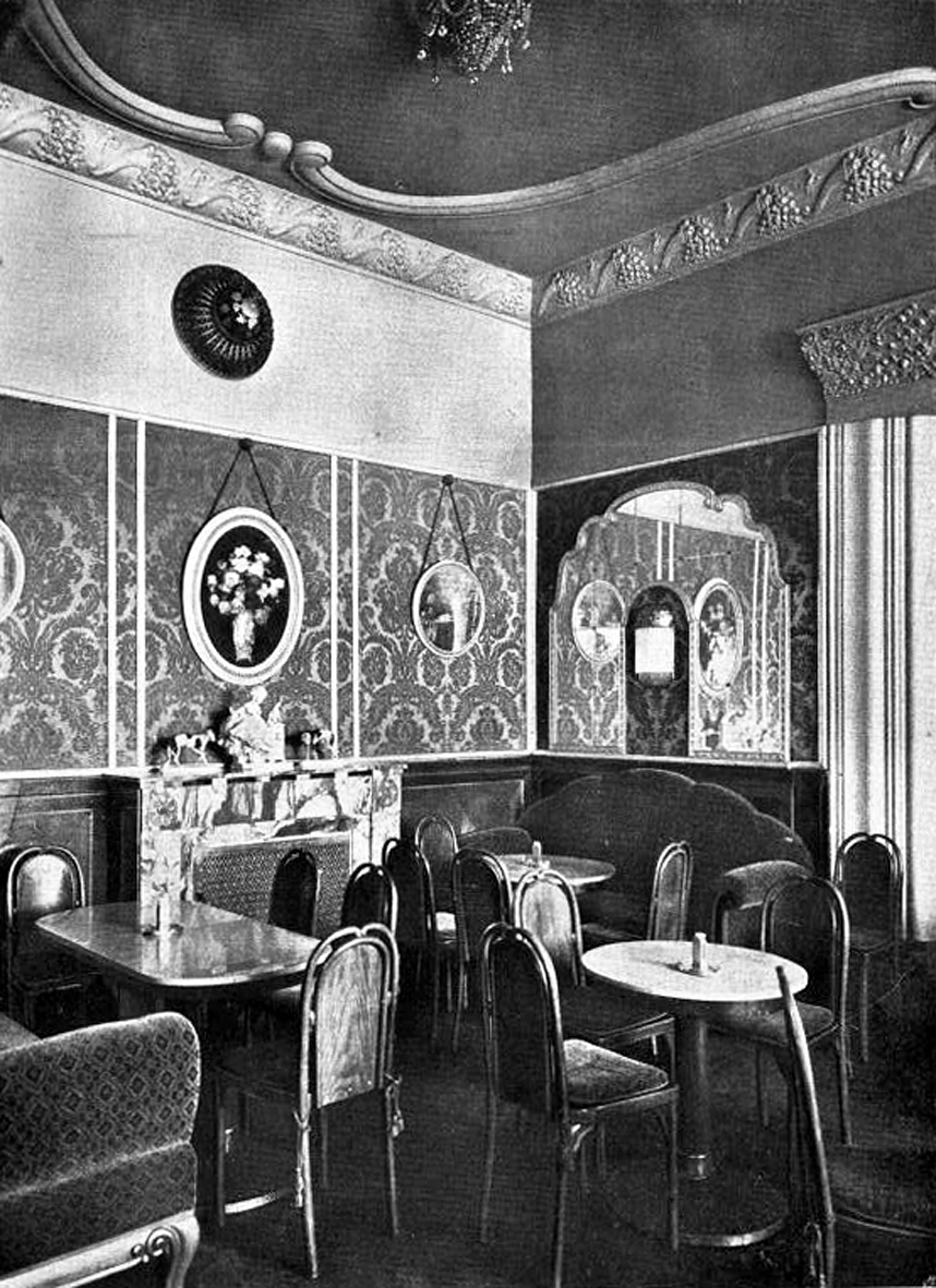 Café Herrenhof, Wien, I., Herrengasse 10, Damensalon (Gebäude 1965 abgebrochen)